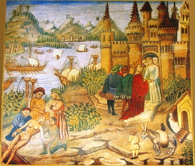 Гравюра, изображающая врачей и их пациентов Салернской врачебной школы XI - XII век.